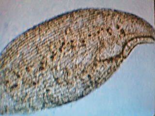 Loxodes